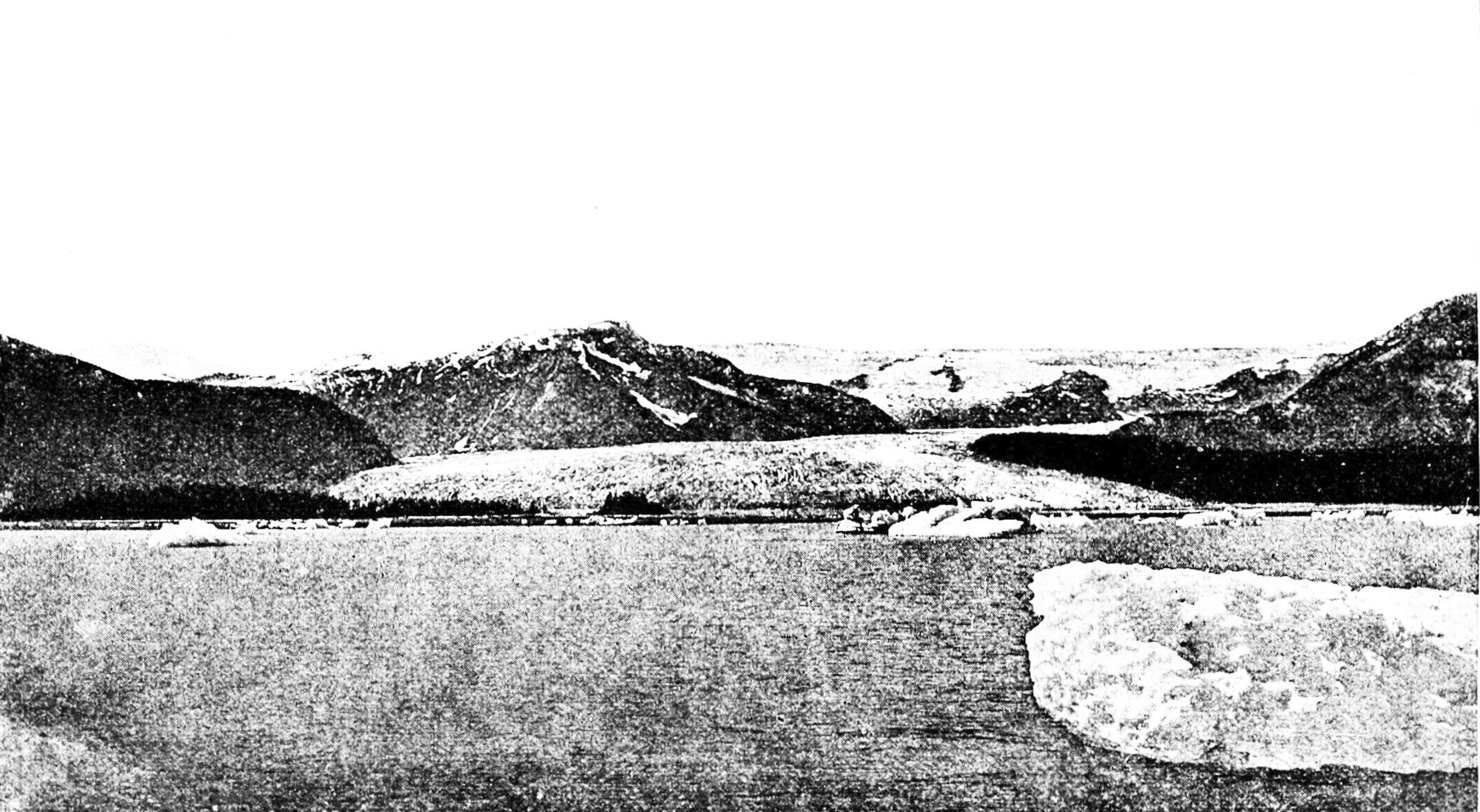 Norris glacier Taku inlet Alaska.jpg